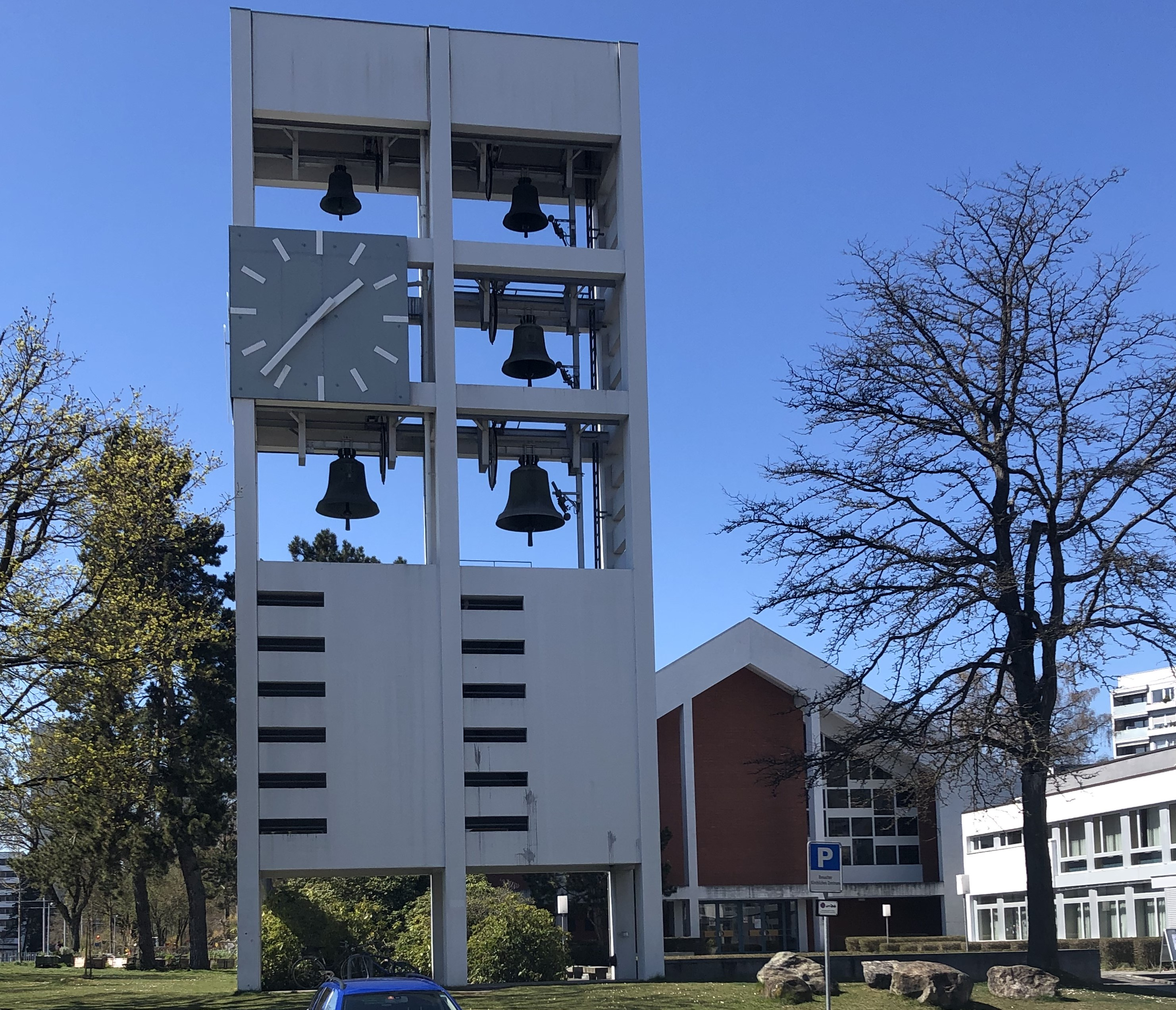 Bethlehemacker Kirche Glockenturm